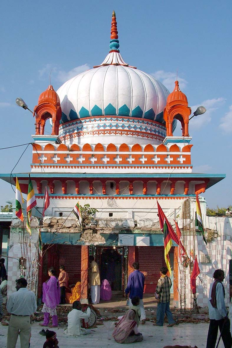 रानगिर (सागर) स्थित हरसिद्धी माता का मंदिर